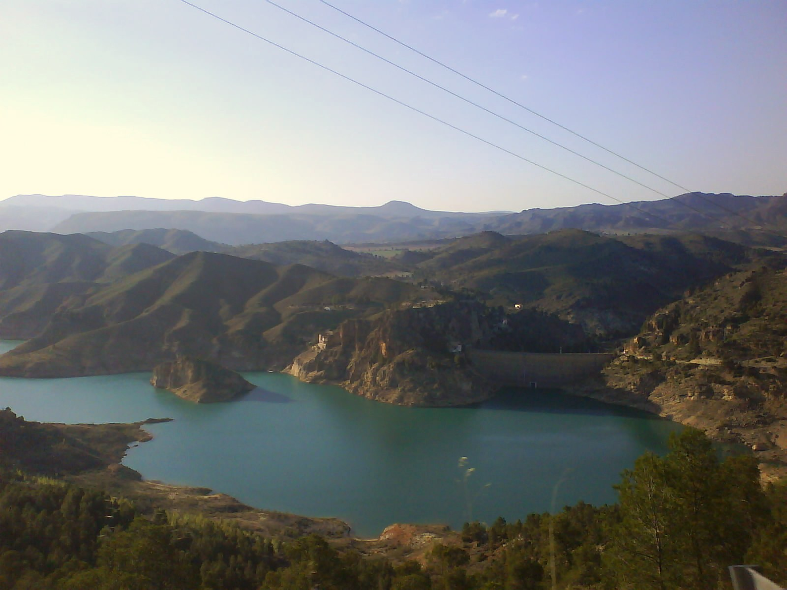 Vista del valle donde se sitúa el Embalse de la Fuensanta en 2008 situado en el municipio de Yeste (Albacete)